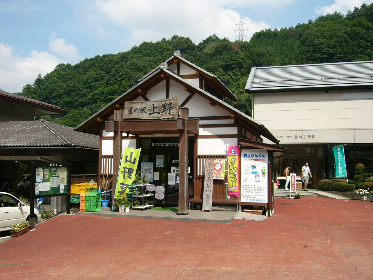 Michinoeki Ueno (Gunma)(道の駅上野)